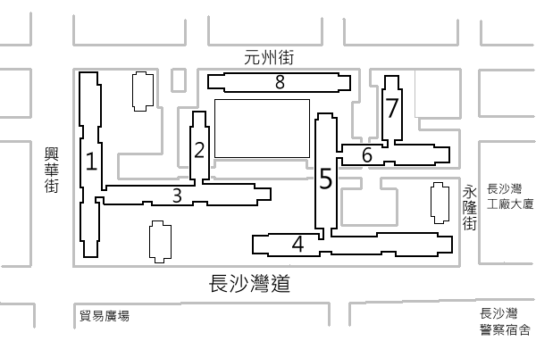 old un chau street estate